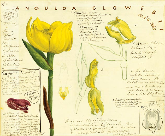 Anguloa clowesii Lindl. (1844)